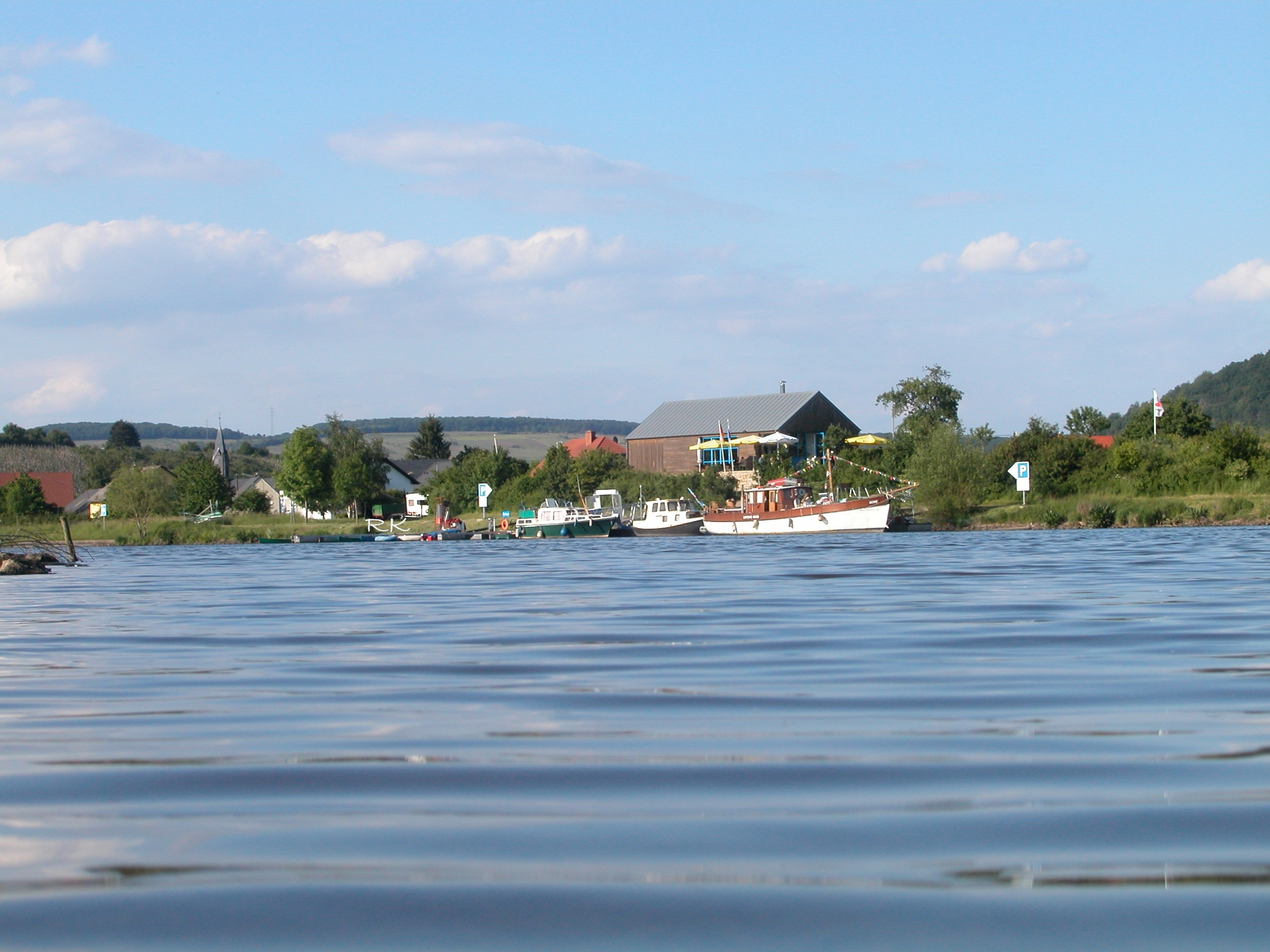 Freizeitanlage Schoden, Blick vom anderen Saarufer